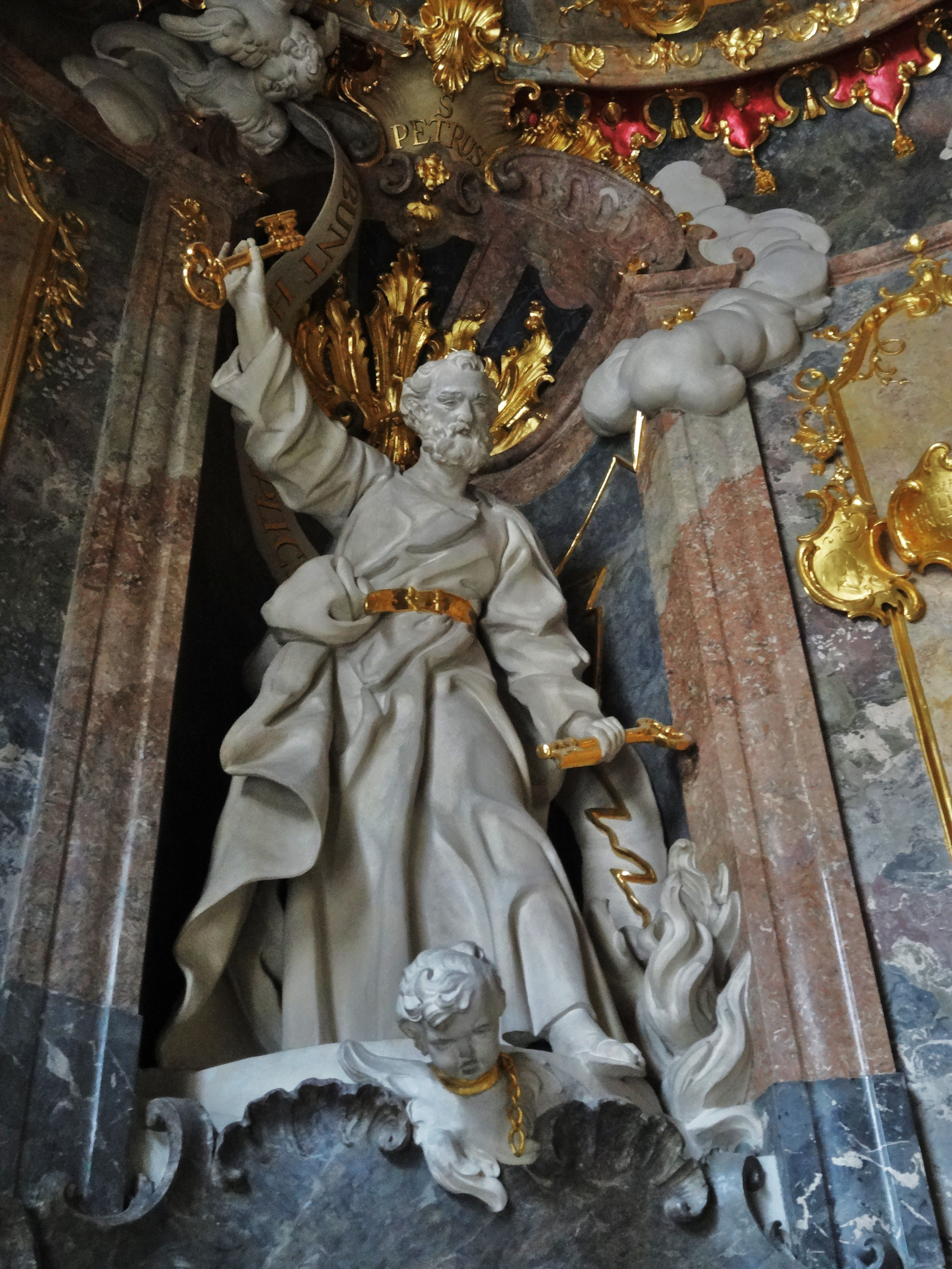 Asamkirche (München), Vorraum. Statue des Apostels Petrus mit den beiden Schlüsseln